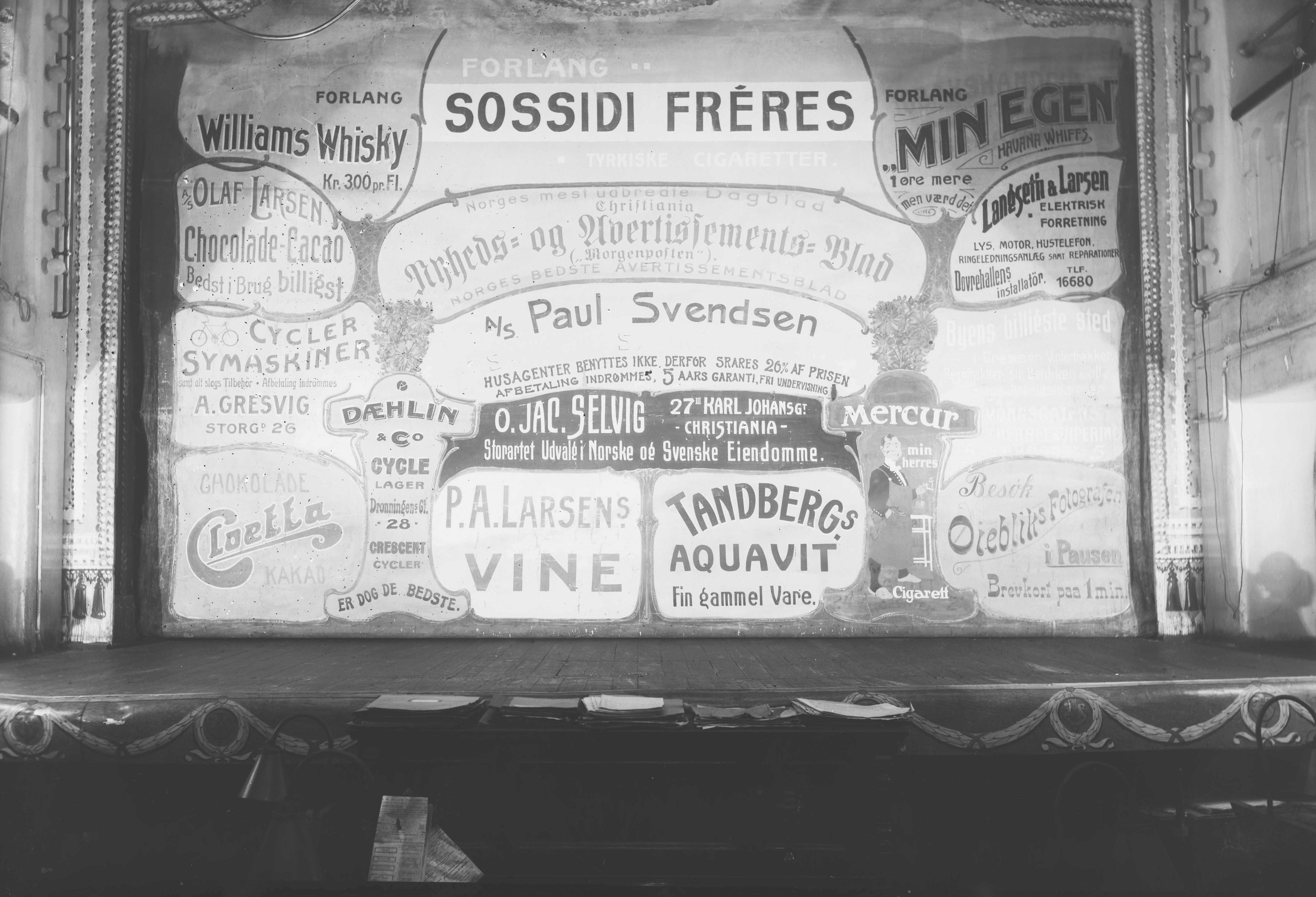 Bildet er hentet fra Nasjonalbibliotekets bildesamling. Anmerkninger til bildet var: Påskrift arkivark: Dovrehallen. Tæppet Arkivnummer: 187 Oslo, Oslo, Oslo